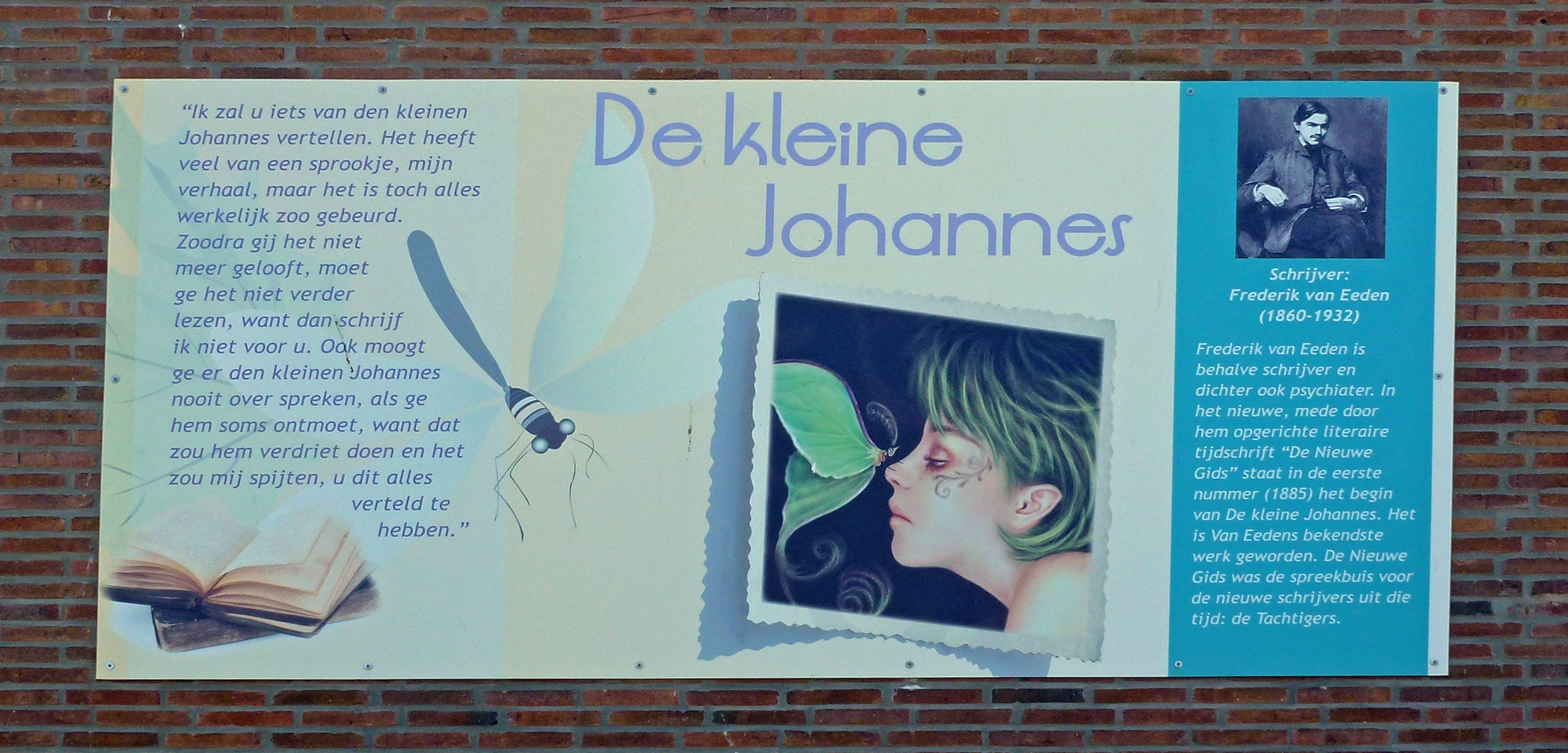 Straatnaam beschrijving. De kleine Johannes (1885) is geschreven door Frederik van Eeden